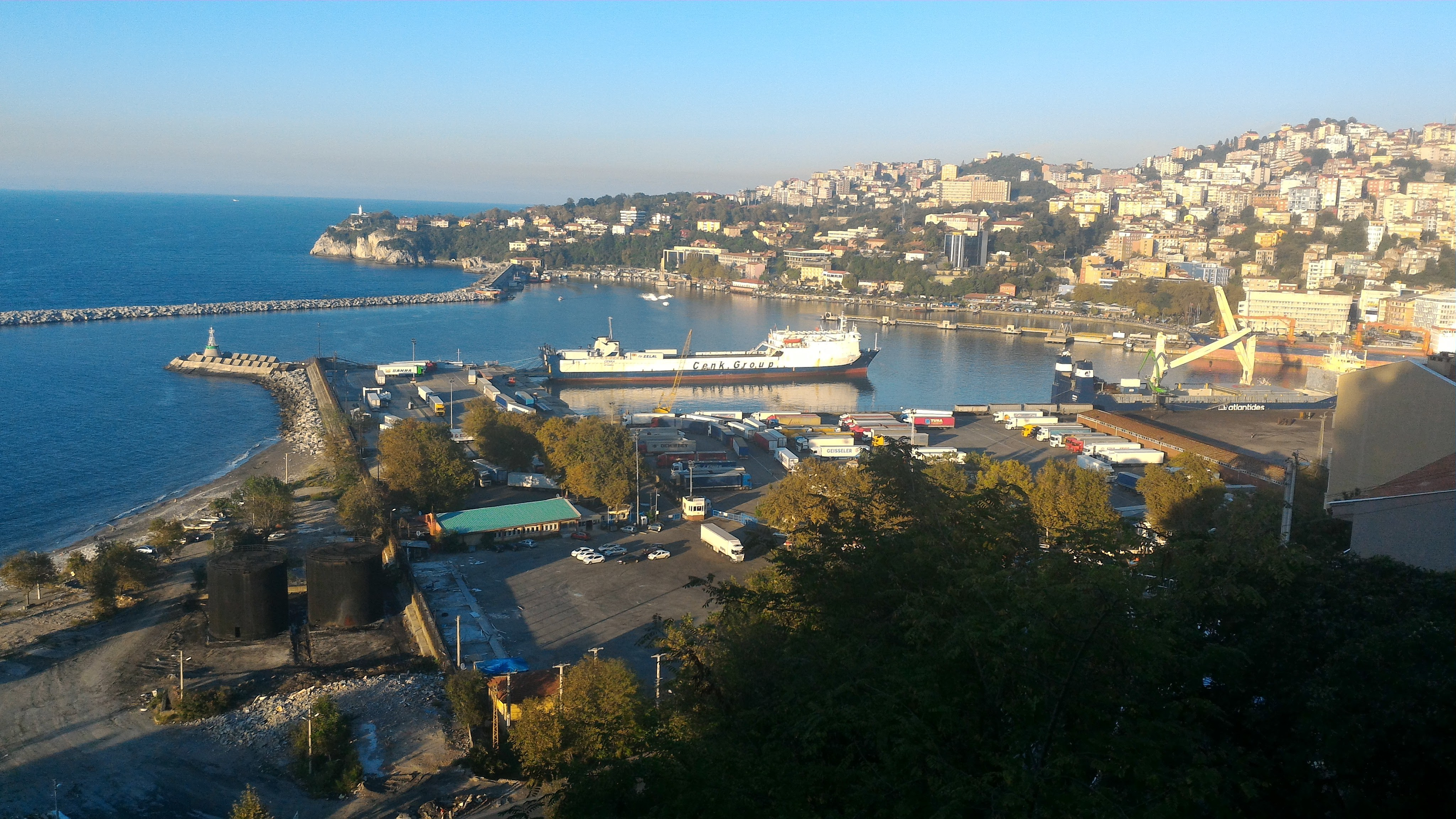 Zonguldak